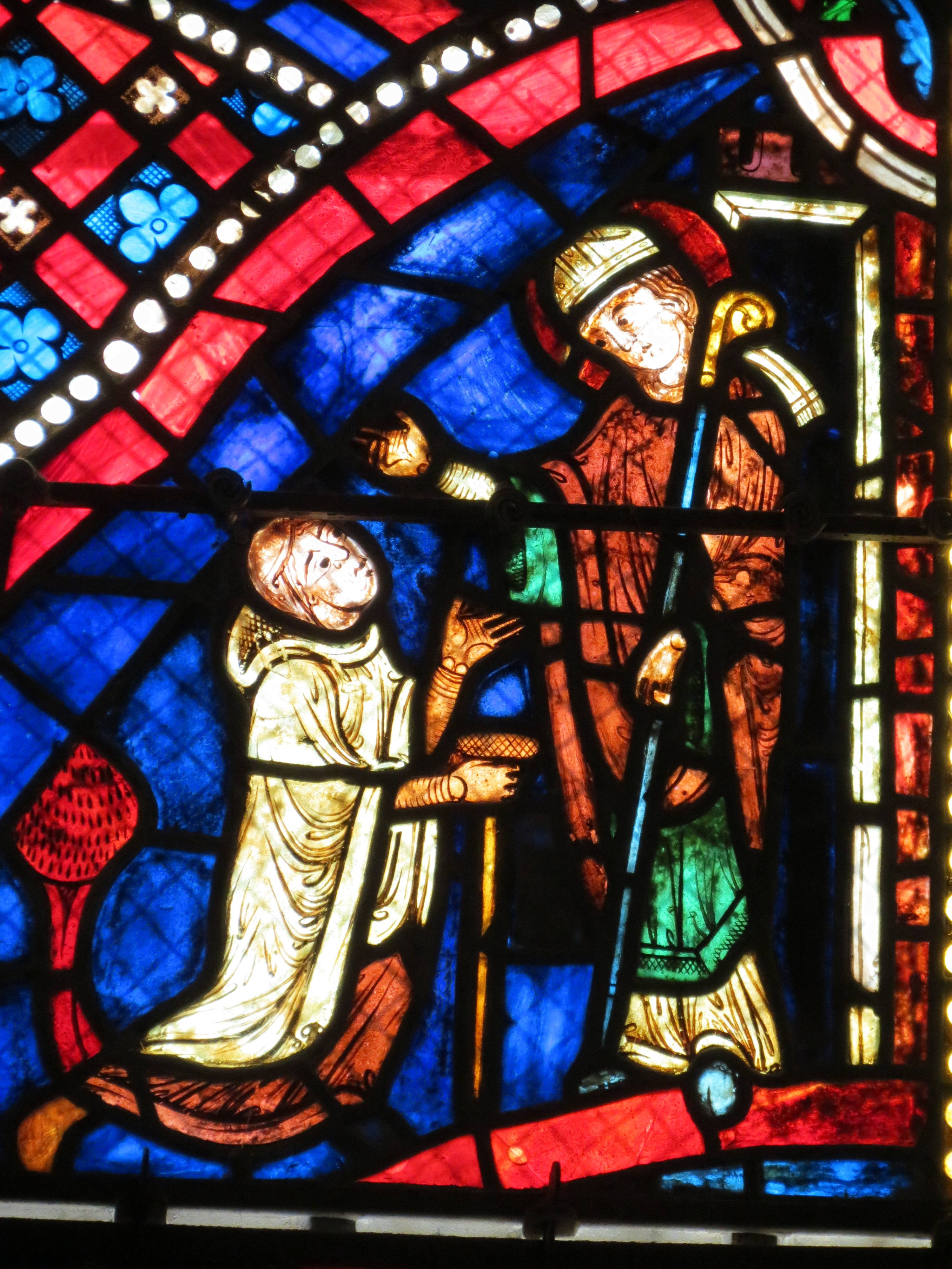 Extrait du vitrail de la chapelle Saint-Lô, racontant la guérison par Lô d'une femme aveugle.